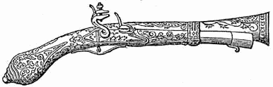 Schrotpistol aus dem 17. Jahrhundert - aus Meyers Konversationslexikon von 1888 - Public Domain